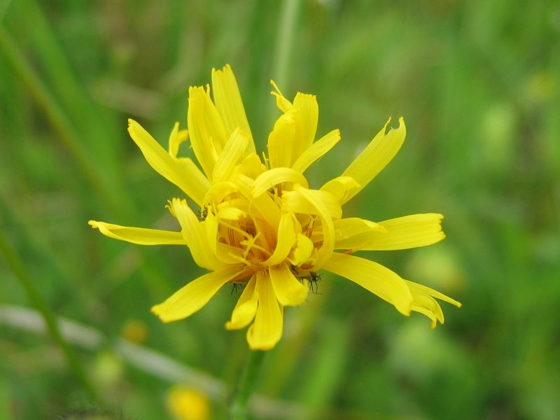 Sumpf-Pippau (Crepis paludosa), Gragetopshof